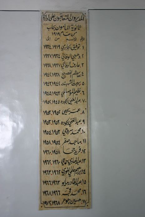 List of Mangers of AlMamoon School in Aleppo